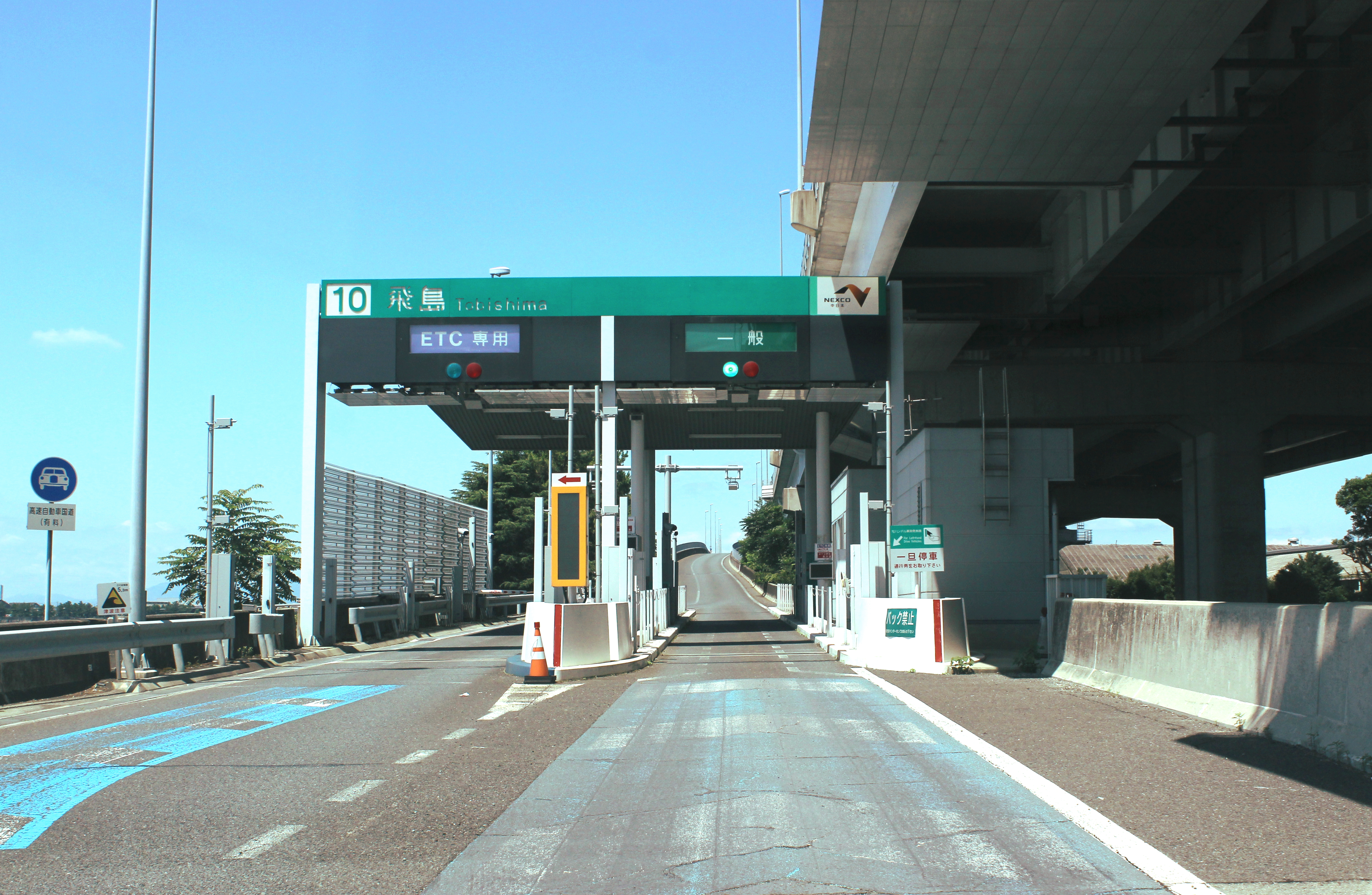 伊勢湾岸自動車道・新名神高速道路 飛島ＩＣ